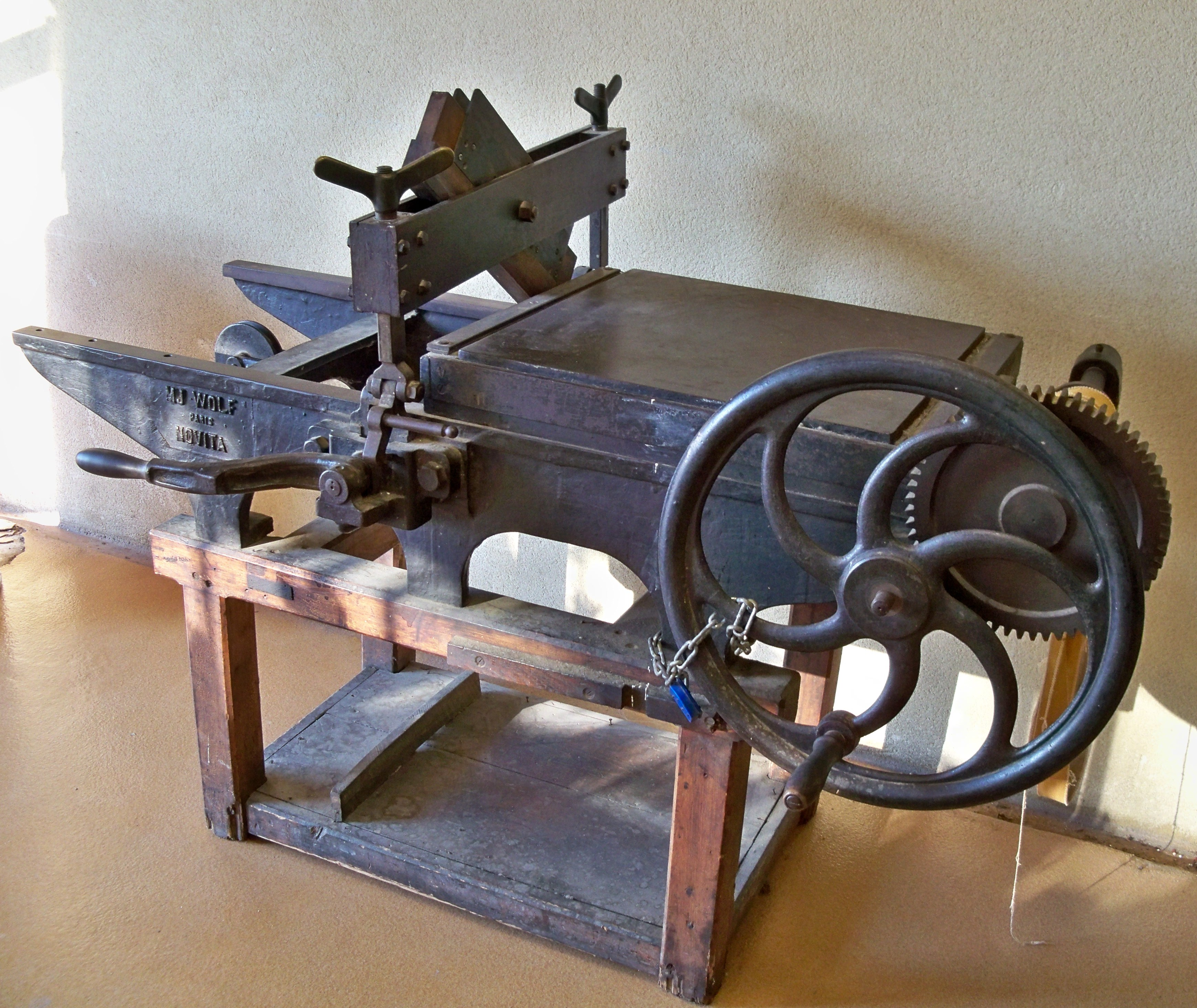 presse au moulin de papier à Fontaine de Vaucluse, France